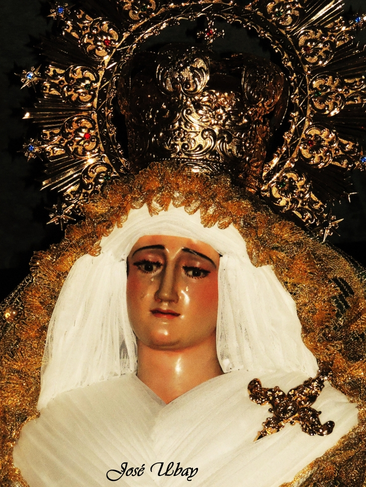 María Santísima de la Esperanza de Vegueta. (1892) Obra del escultor Arsenio de las Casas Martín. Parroquia de Santo Domingo de Guzmán - Las Palmas de Gran Canaria.